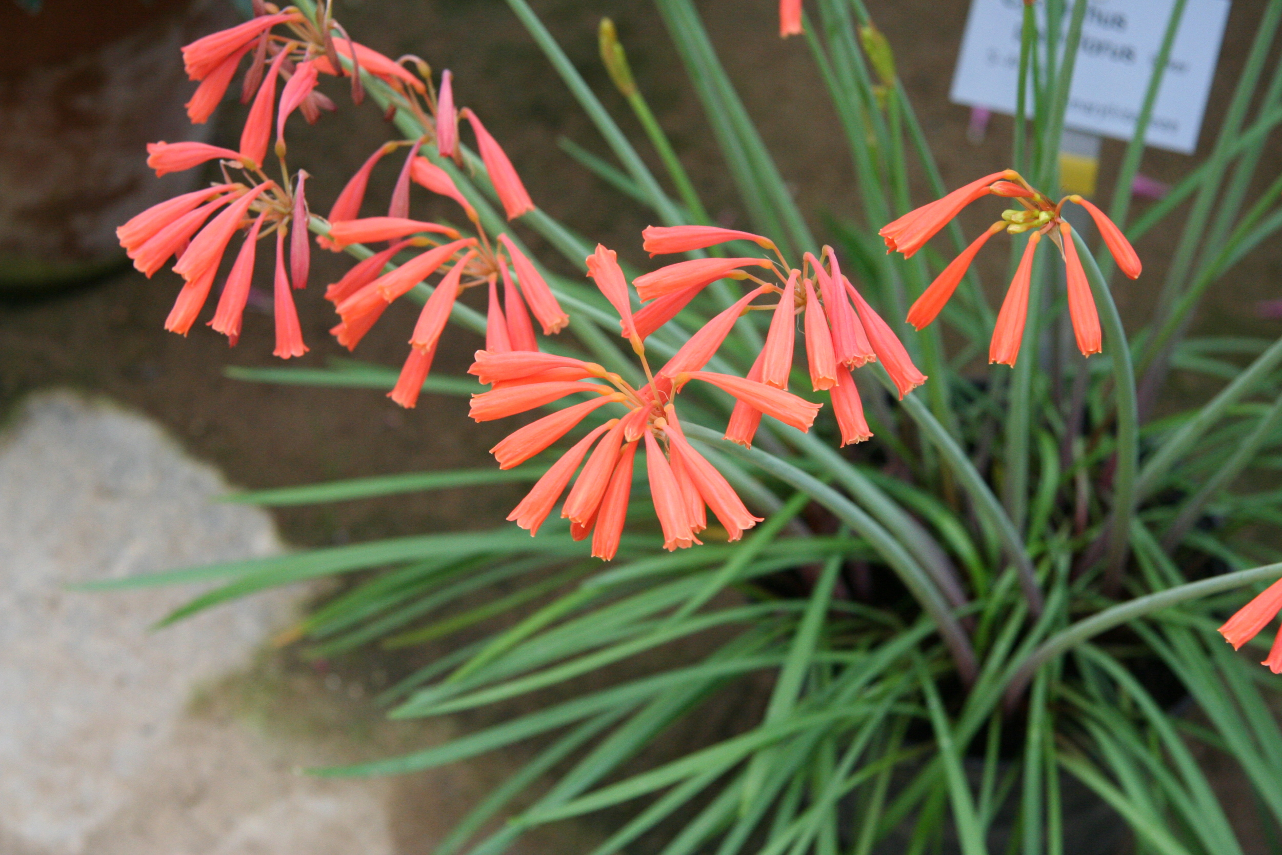 Cyrtanthus parviflorus im Botanischen Garten Bayreuth